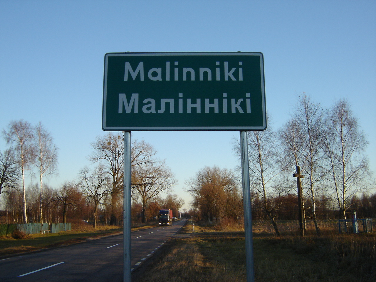 Tablica miejscowości.